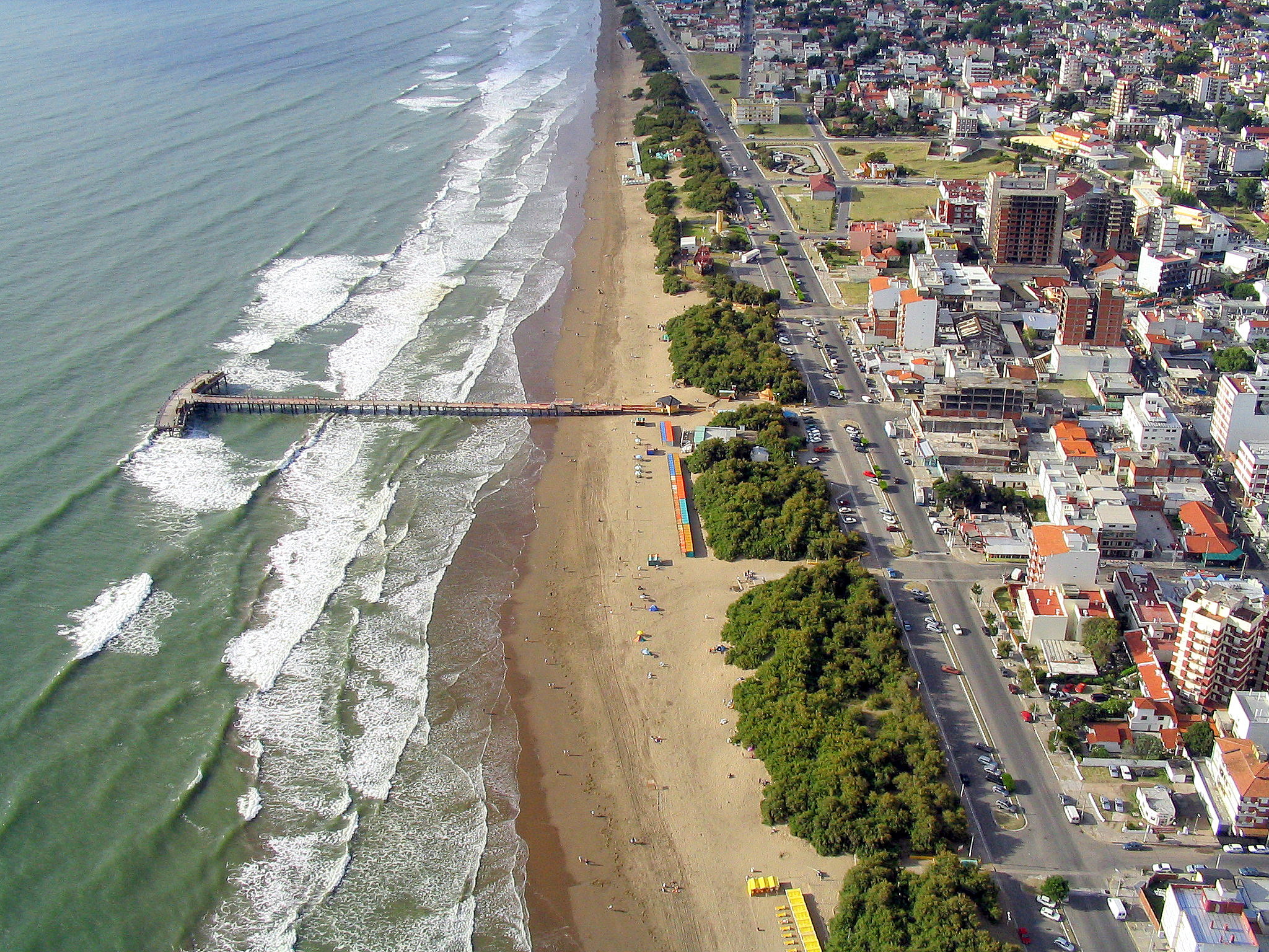 Foto Aérea de la ciudad de Santa Teresita